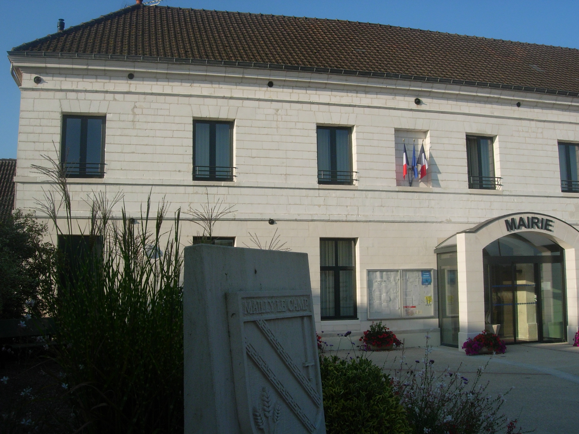 Mairie de Mailly-le-Camp